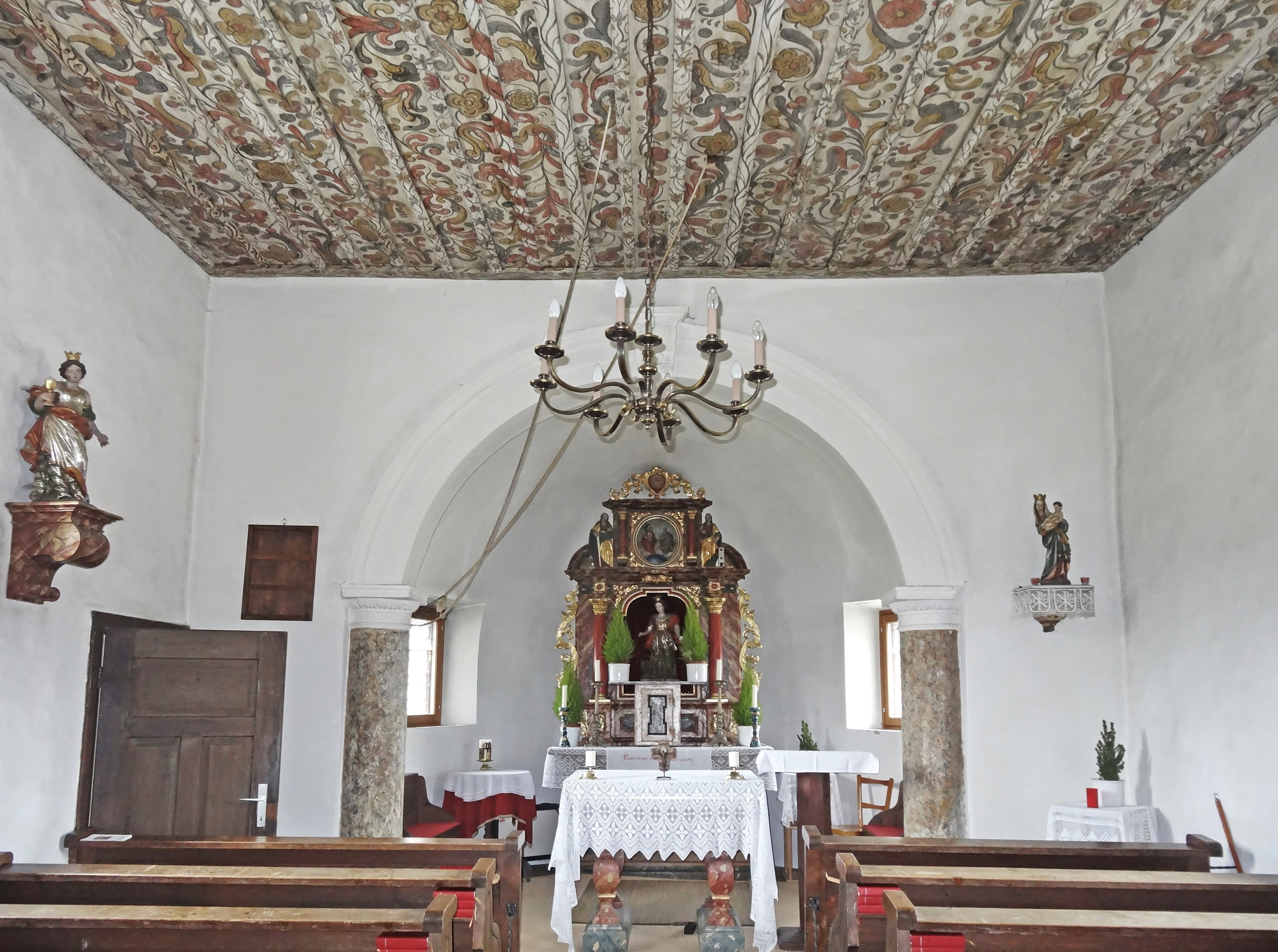 Kath. Filialkirche St Margarethen (Tiffen), Innenansicht